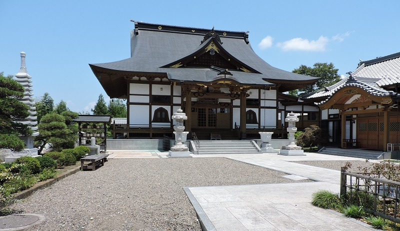 松吟寺境内